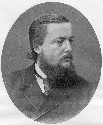 Ferdinand Dümmler (1859–1896), deutscher Altphilologe und Archäologe. Photographie von Camille Ruf (im Besitz von Prof. Paul Wolters, München)